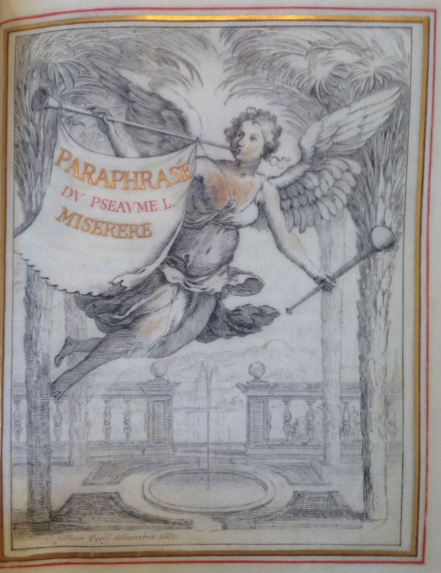 Page de titre du manuscrit "Paraphrase du psaume L. Miserere" écrit par Charles Gilbert, 1663. Paris, Bibl. Maz. : Ms. 4746.